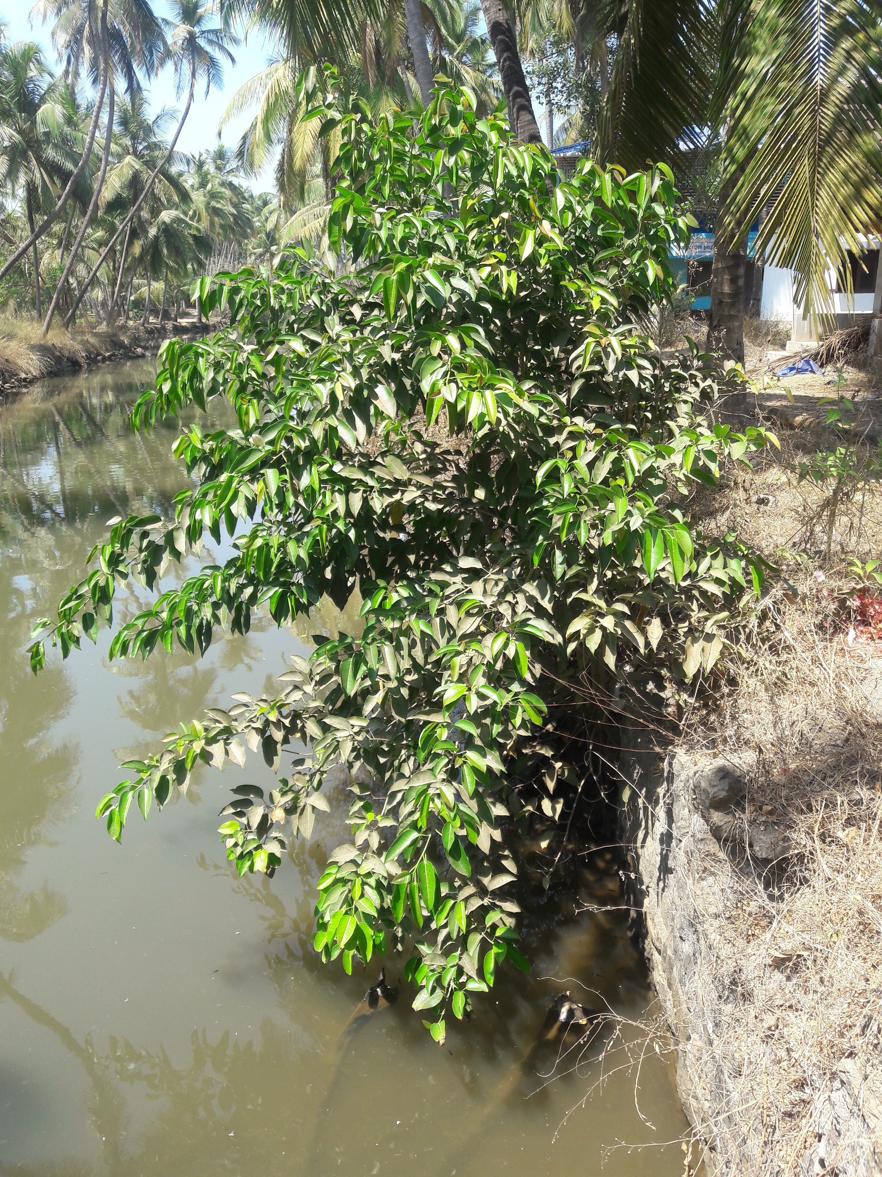 മലപ്പുറം ജില്ലയിലെ പൊന്നാനി താലൂക്കില്‍ വെളിയംകോട് പുതിയിരുത്തിയില്‍ കനോലി കനാലിന്‍റെ ഭിത്തിയില്‍ വളരുന്ന .Indian Bat tree, Indian Bat fig ശാസ്ത്രീയ നാമം Ficus amplissima കുടുംബം Moraceae.